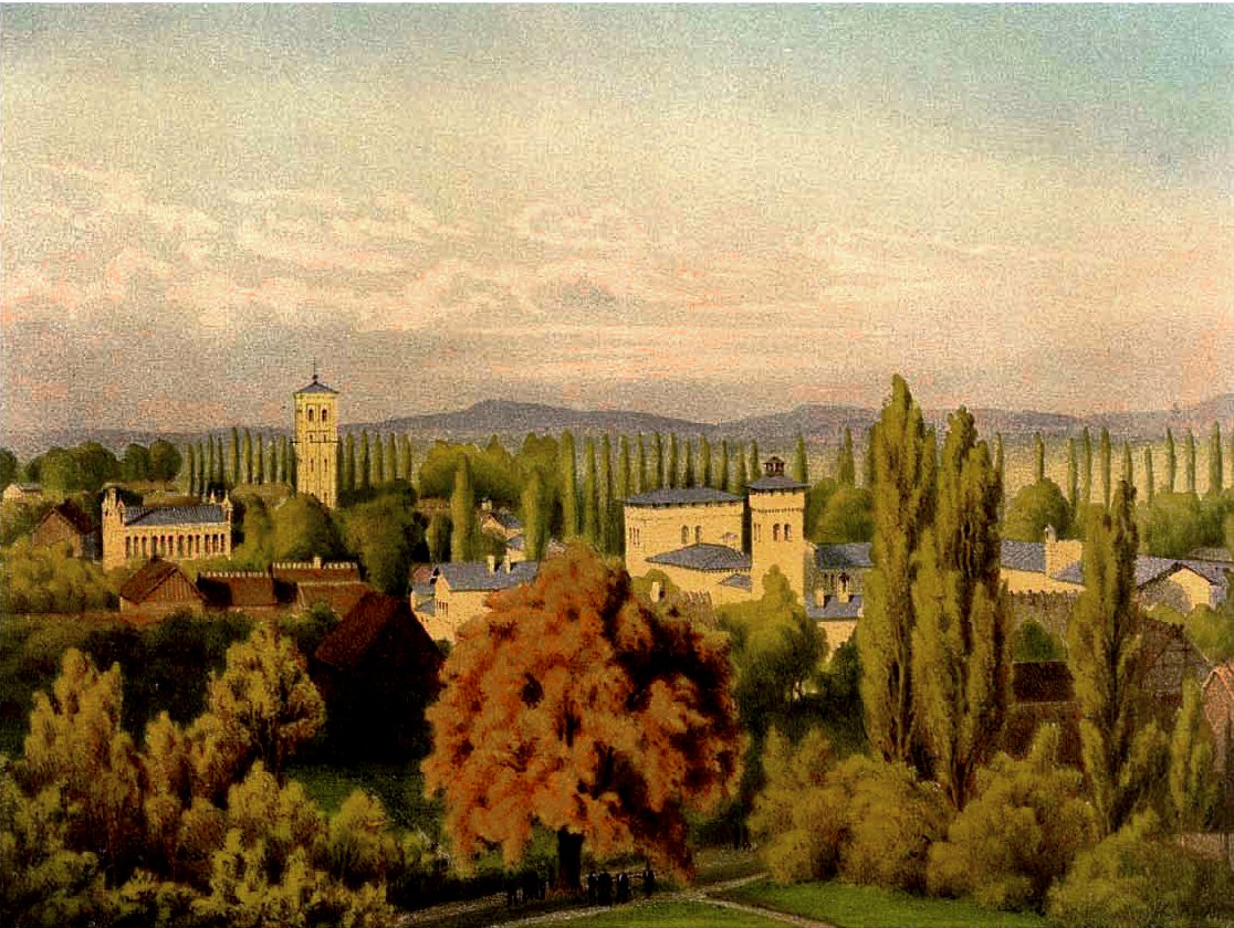 Krongut Bornstedt, Kreis Ost-Havelland, Provinz Brandenburg